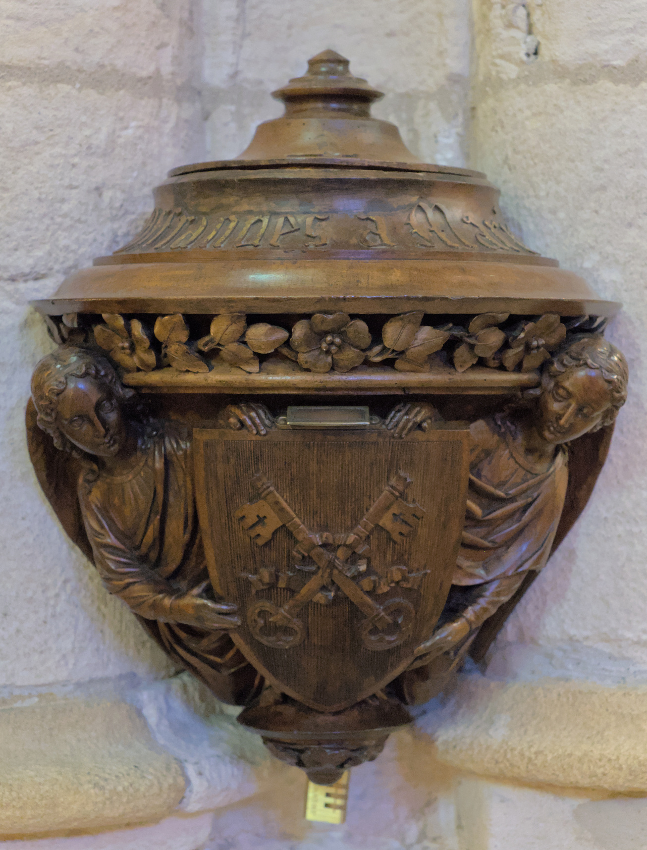 Tronc pour la canonisation de Pauline Jaricot : "nous vous proposons de déposer dans ce tronc, les témoignages dse grâces éventuelles obtenues par l'intercession de la vénérable Pauline Jaricot : guérisons extraordinaires, conversions et faveurs exceptionnelles." Nouveau site internet afin de récolter les témoignages